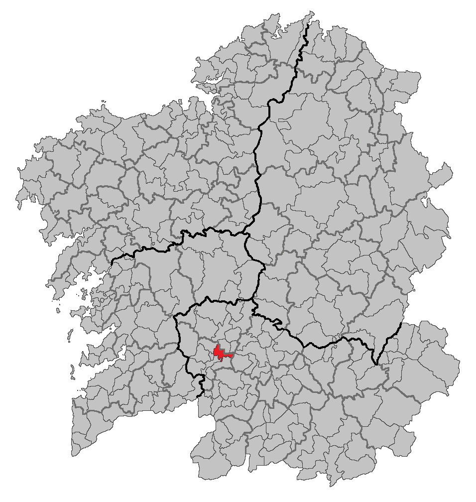 Mapa coa localización do concello de Cenlle.